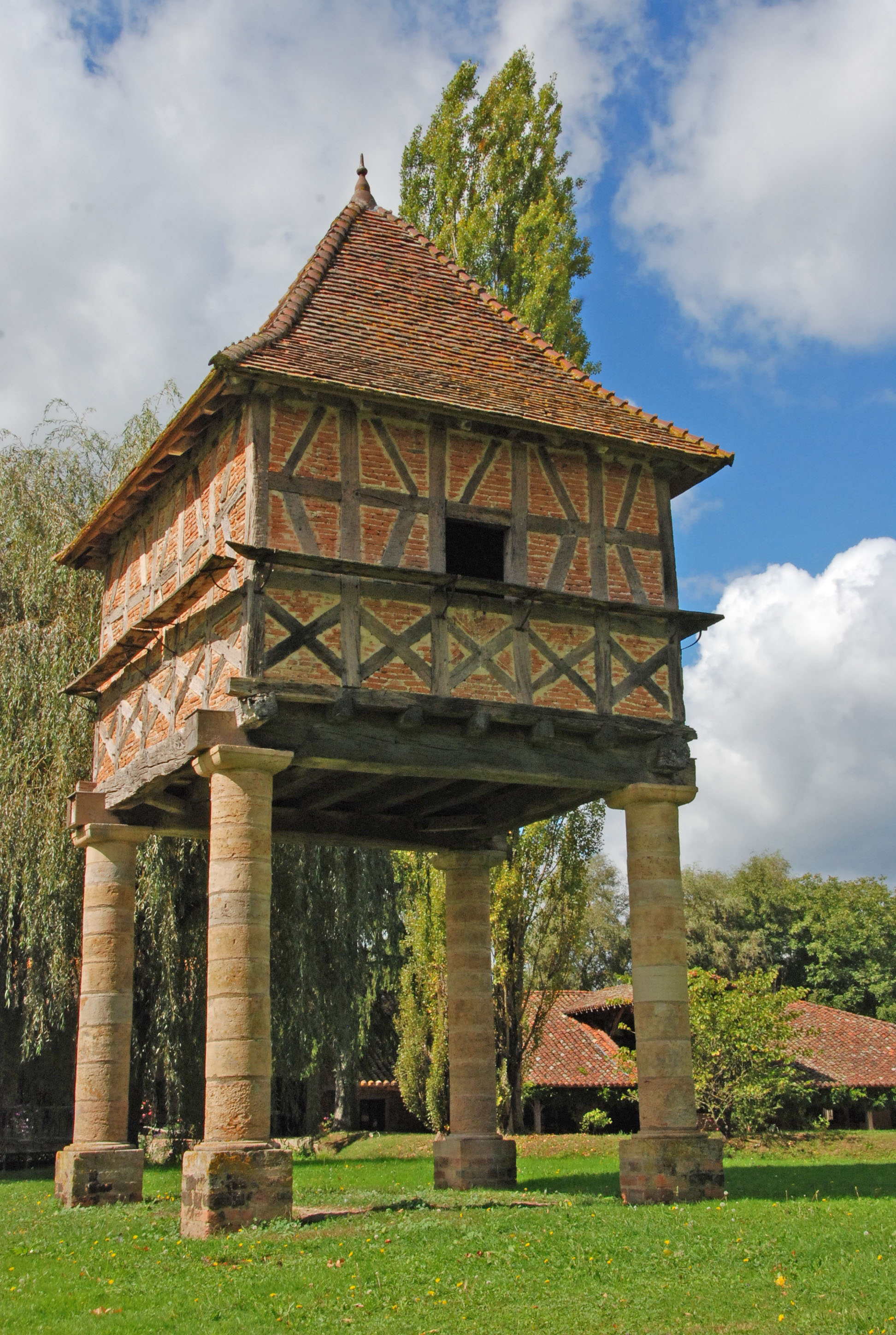 Pigeonnier du Moulin Grand, Les Prés Magnin (Classé, 1993) .